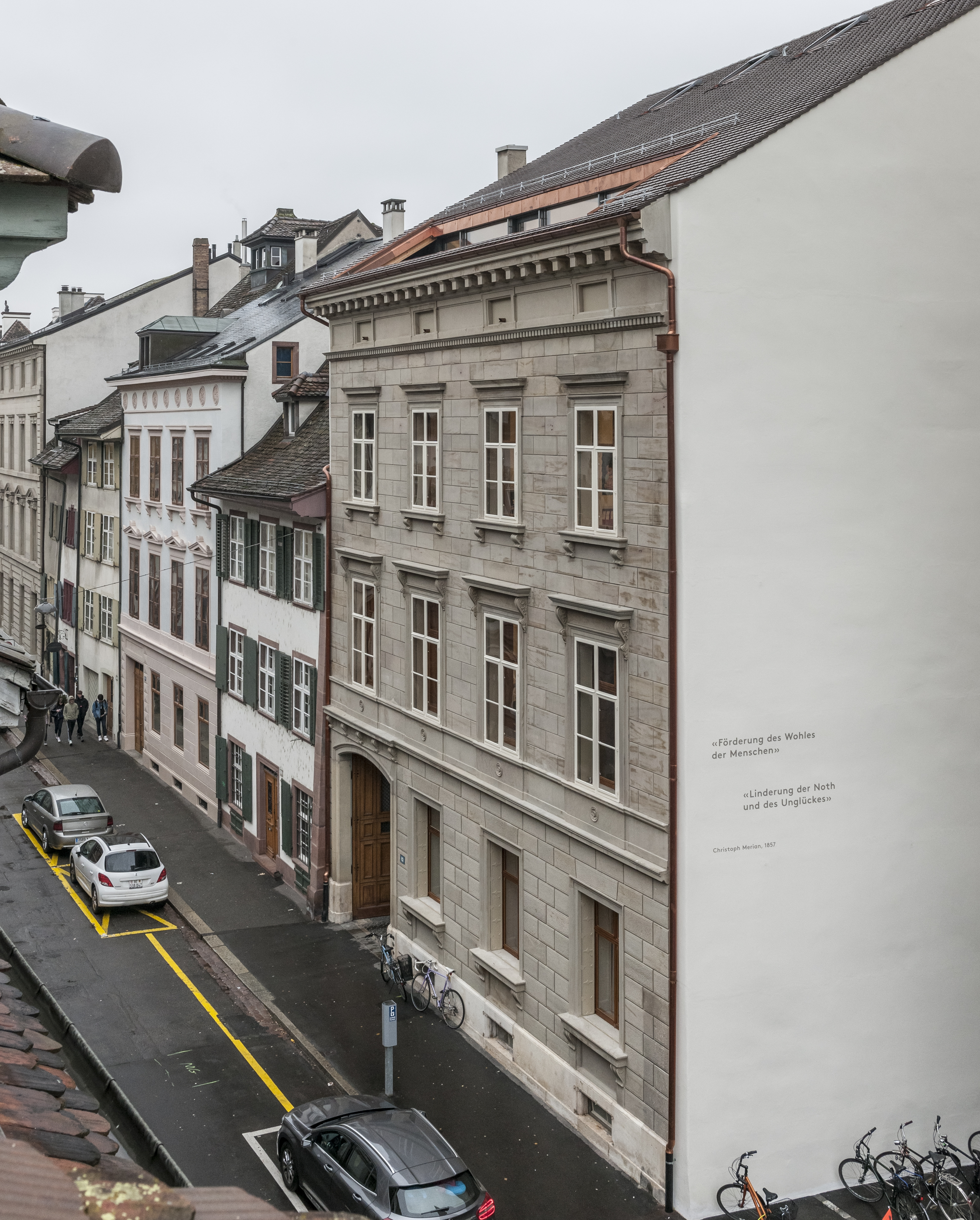 Ansicht Hauptsitz Christoph merian Stiftung Basel, St. Alban-Vorstadt 12